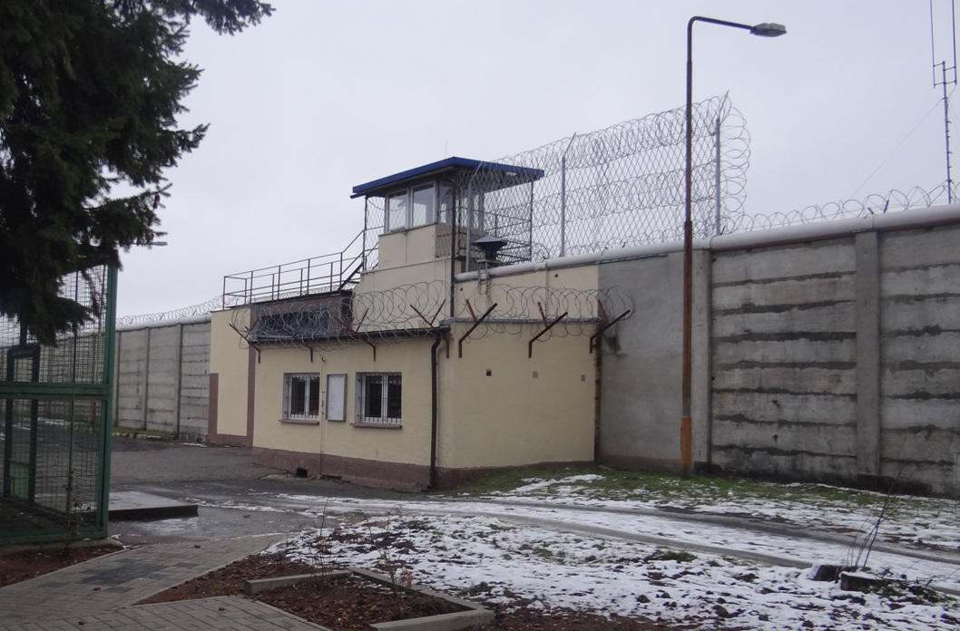 Zakład Karny Stargard Szczeciński.